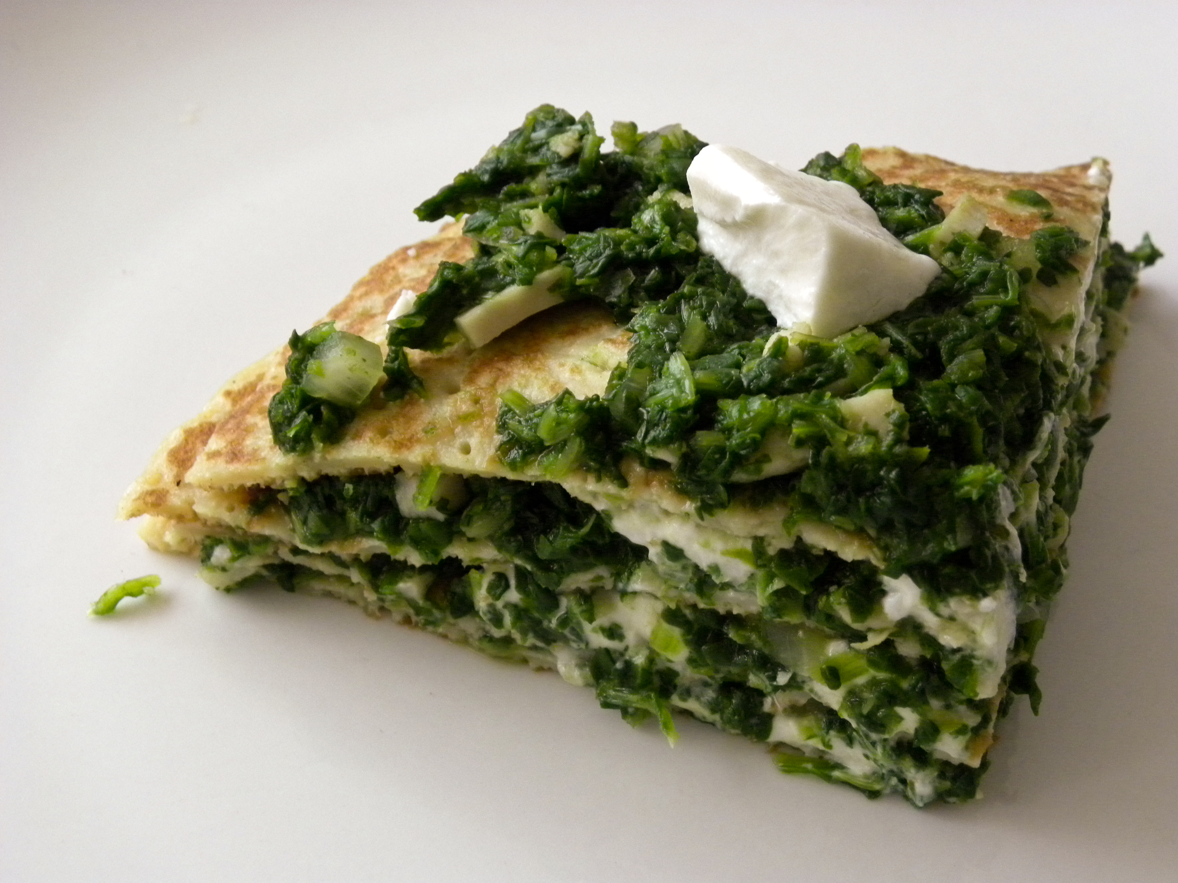 Gratin d'oreilles d'âne avec crêpes